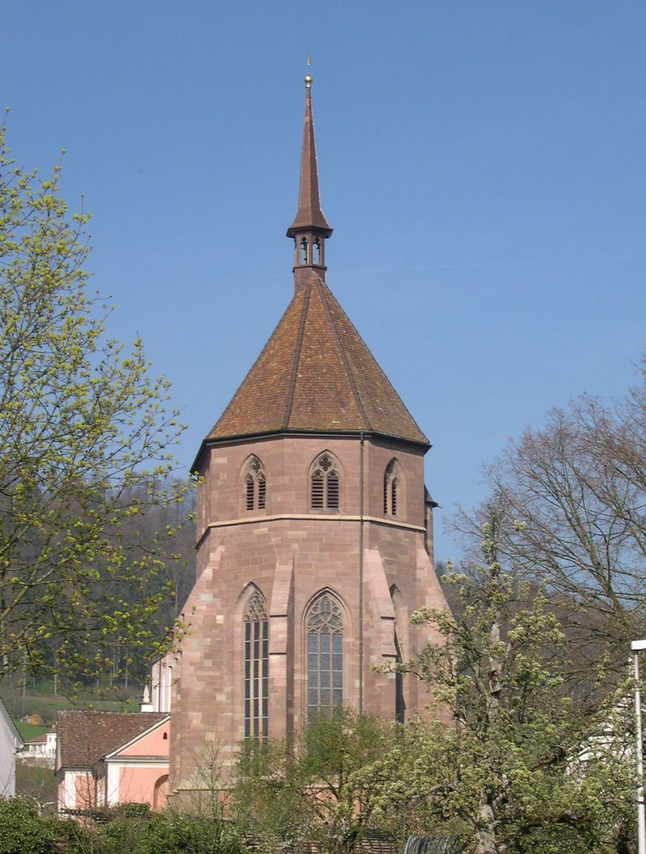 Gotischer Turm des Verenamünsters in Zurzach